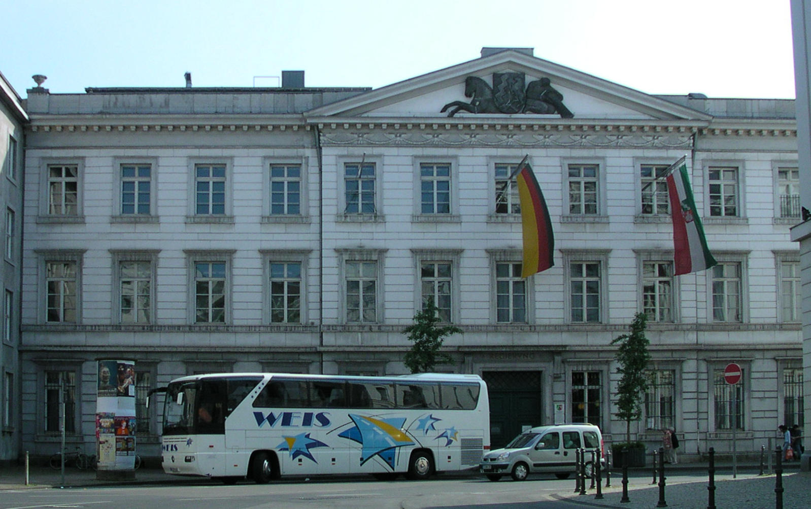 Ehemaliges “Regierungsgebäude”, d.h. Gebäude der Verwaltung des Regierungsbezirks Aachen am Stadttheater, zugleich eine Station der “Wege gegen das Vergessen”